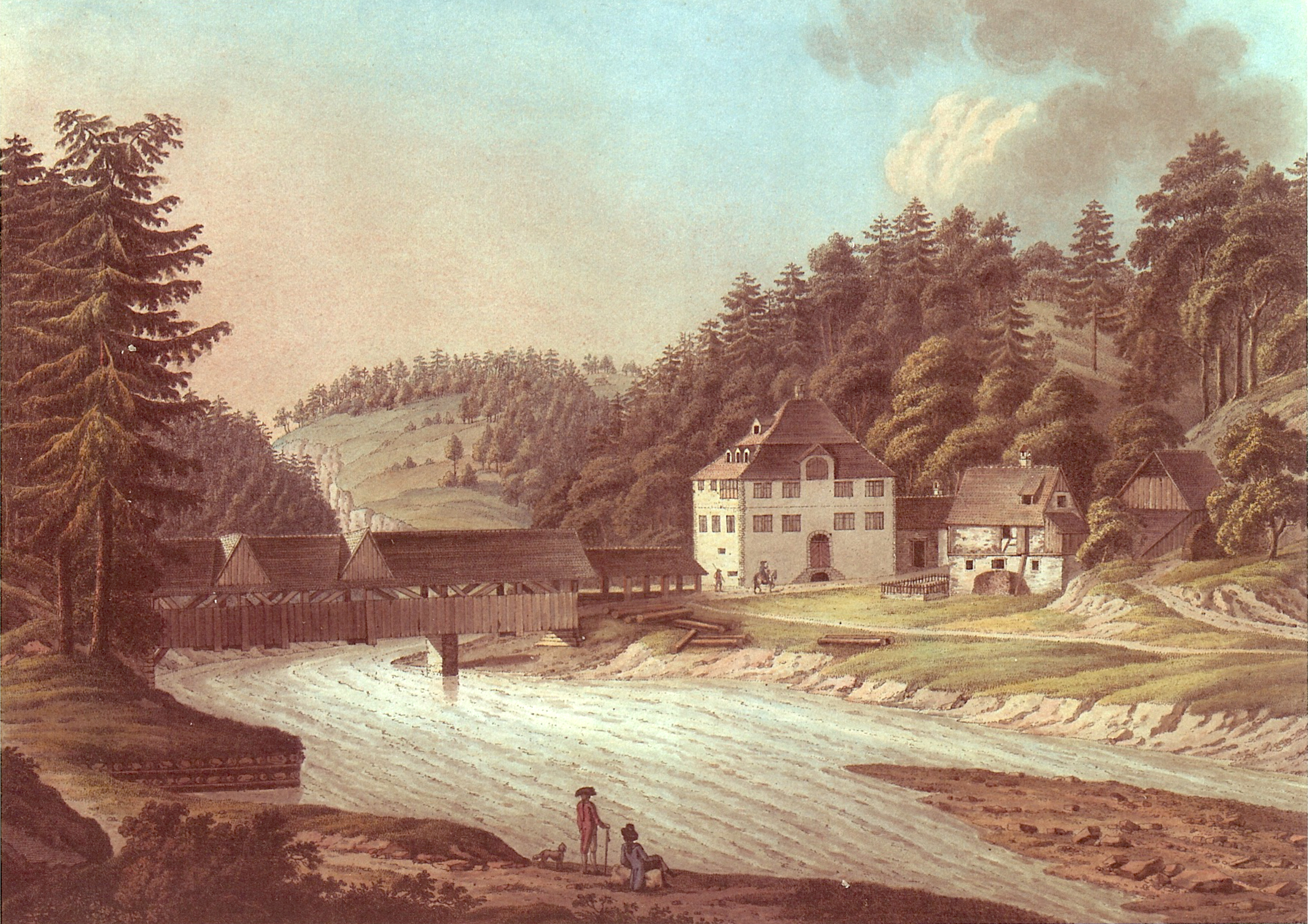 Die Kräzernbrücke über die Sitter bei Winkeln kurz nach dem Bau der Fürstenlandstrasse durch Abt Beda Angehrn. Das äbtische Zollhaus (Mitte) wurde 1776 erbaut. Rechts am Bildrand die Mühlen am Chräzerenbach, vorne angedeutet die vormalige Furt durch die Sitter.